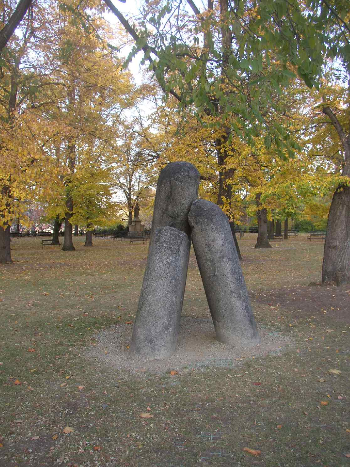 So called Devil's column, Vyšehrad, Prague, Czech Republic. Čertův sloup v Karlachových sadech na pražském Vyšehradě. Photo taken by Miaow Miaow in October 2005, PD-self